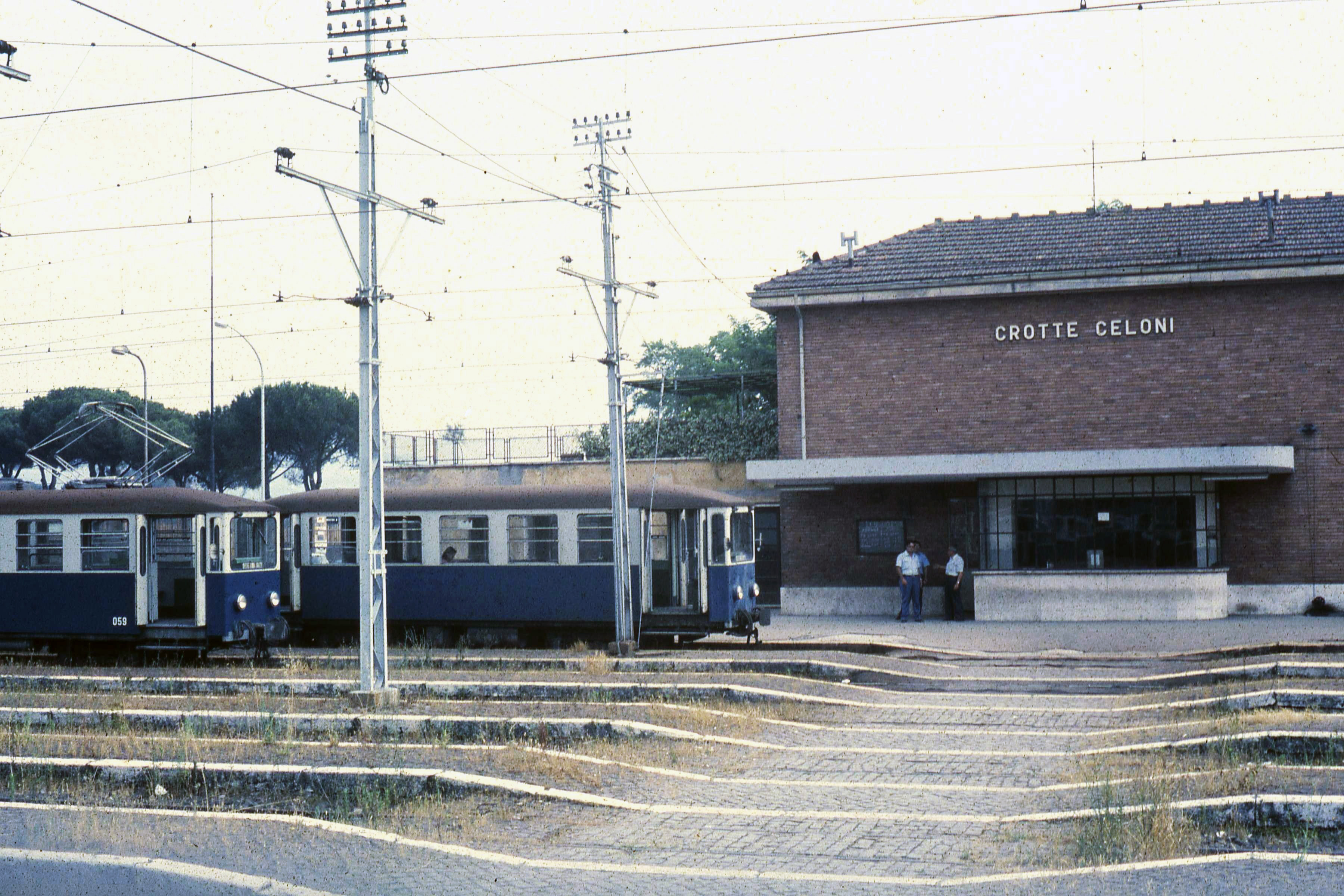 Eindpunt van het voorstadnet van de Rome-Fiuggi-Alatri-Frosinone spoorweg